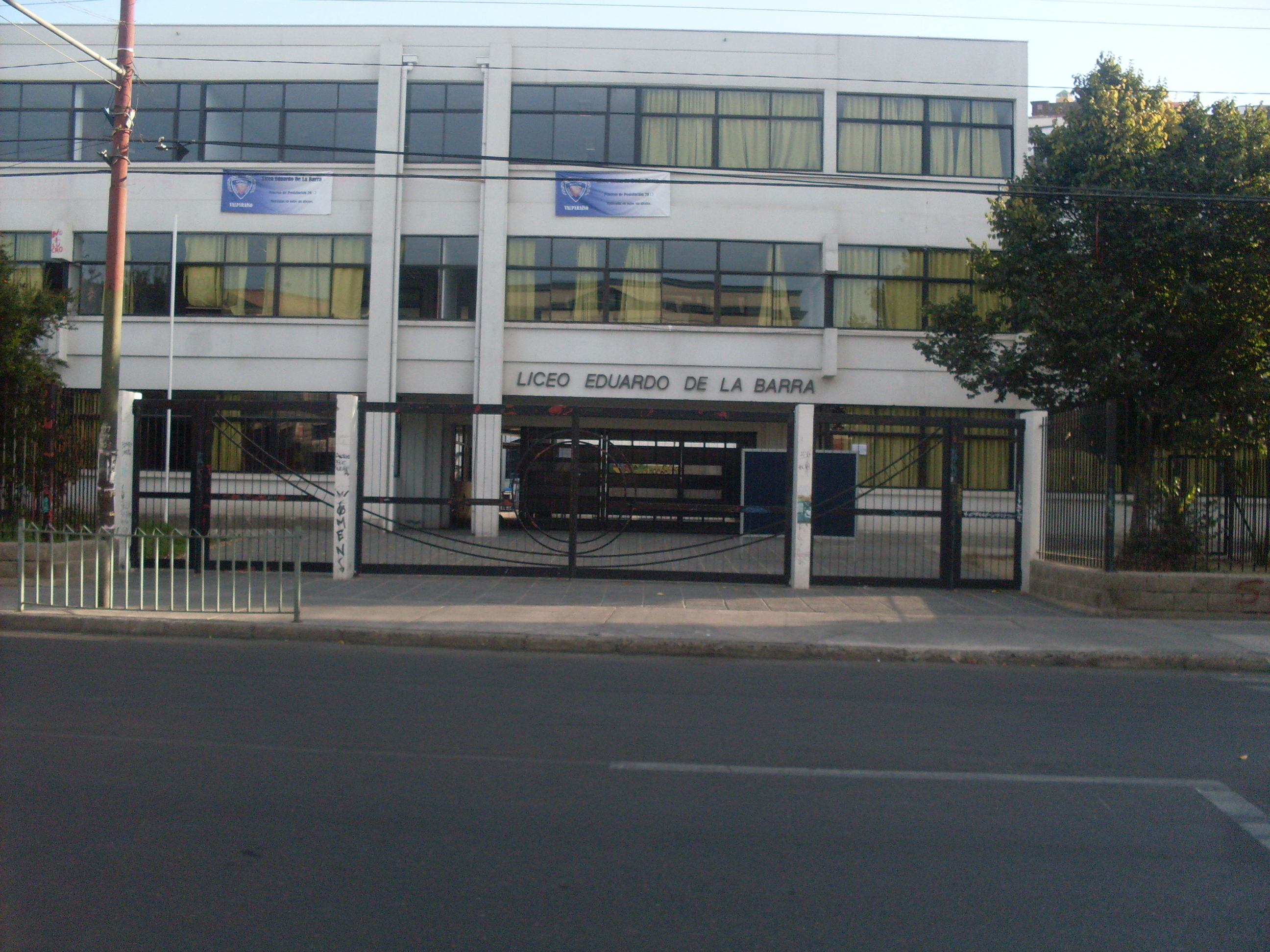 Entrada principal del Liceo Eduardo de la Barra de Valparaíso.